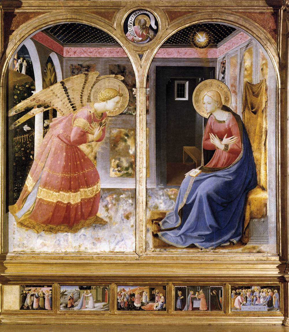 annunciation from S. Maria delle Grazie, S. Giovanni Valdarno